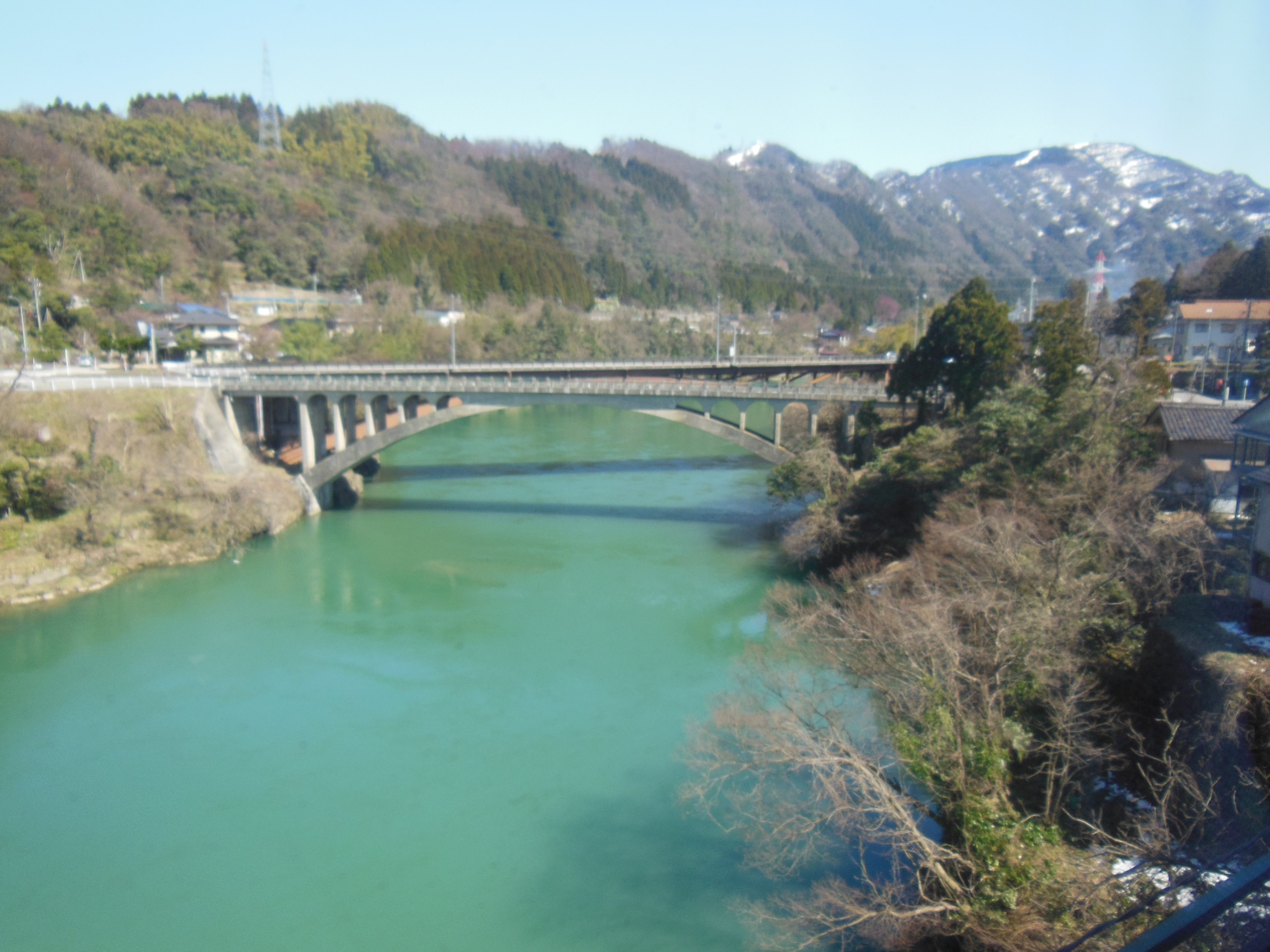 高山本線の車窓より神通川・笹津橋を望む